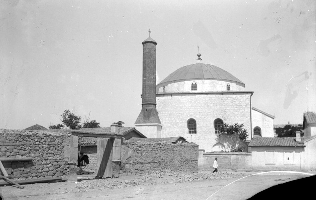 Мечеть Муфтий Джами, г. Феодосия, 1897 в бытность христианским храмом